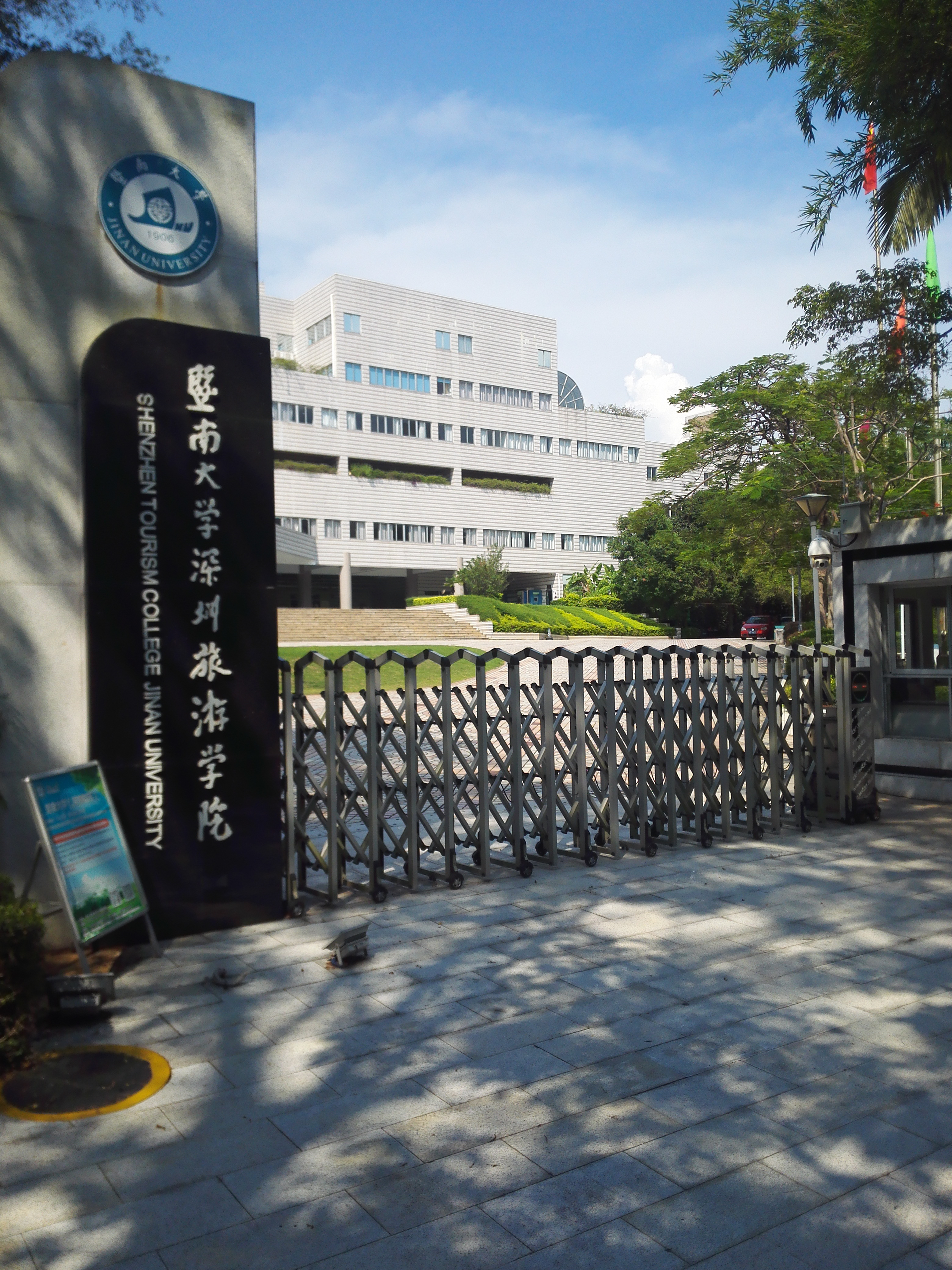 中文（中国大陆）: 暨南大学深圳校区